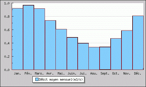 Débit moyen mensuel (en m3/s) de la Rémarde à Saint-Cyr-sous-Dourdan (sur 49 ans de 1968 à 2017)